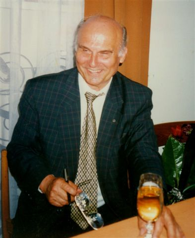 Ryszard Kapuściński (1932-2007), Polish writer and journalist